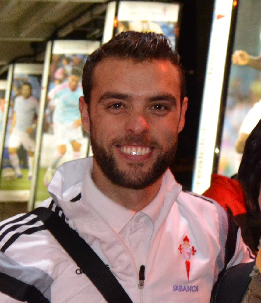 O futbolista Sergio Álvarez Conde